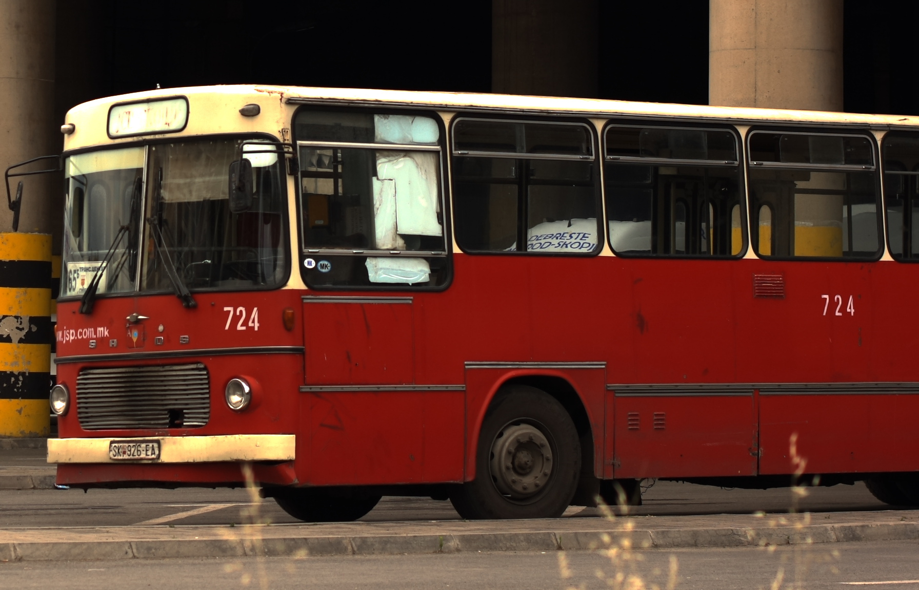 IMG_5585 Macedonia